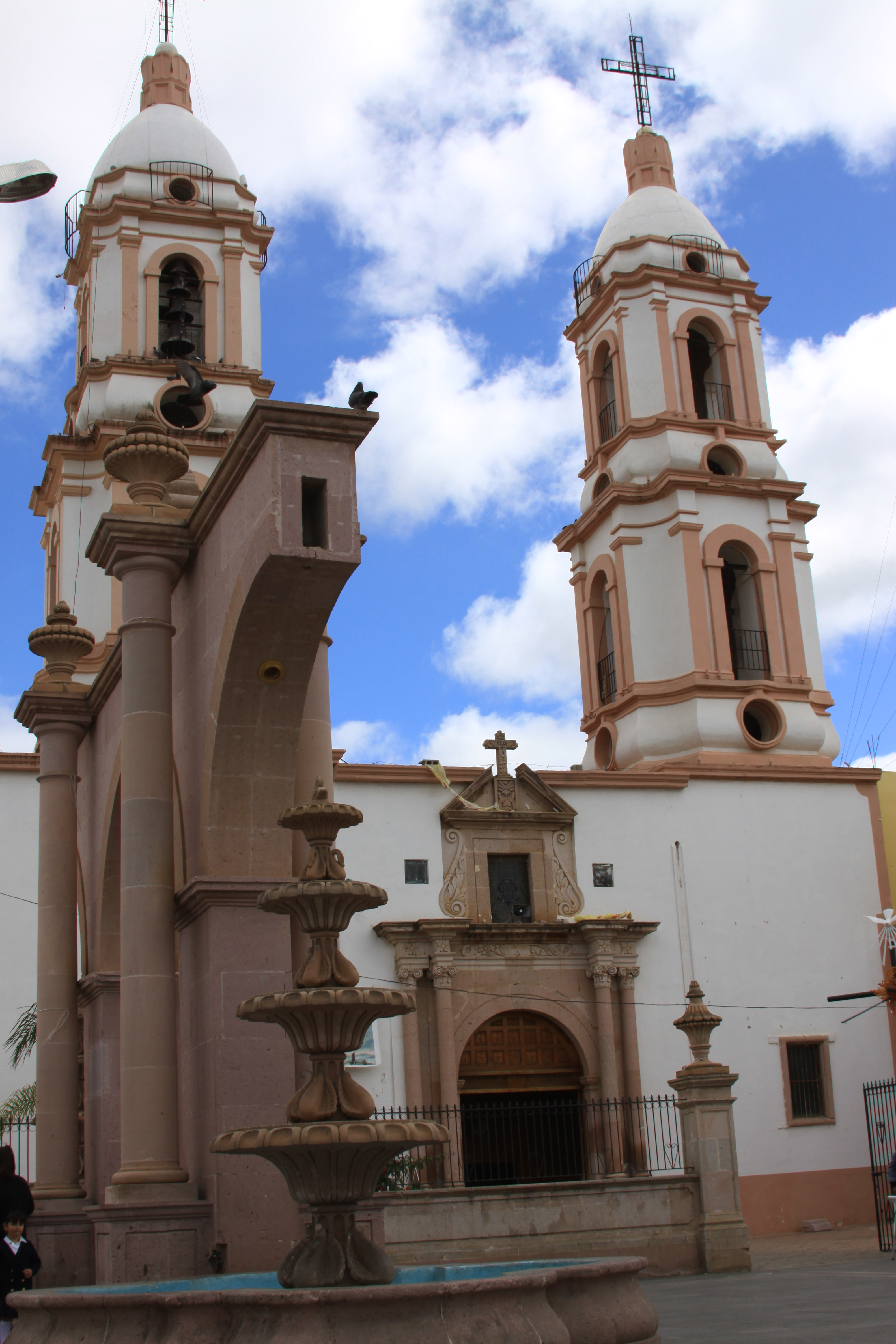 Detalle de la parroquia principal de Calera, y primera en instituirse, se aprecia también el arco de entrada a la plaza principal.